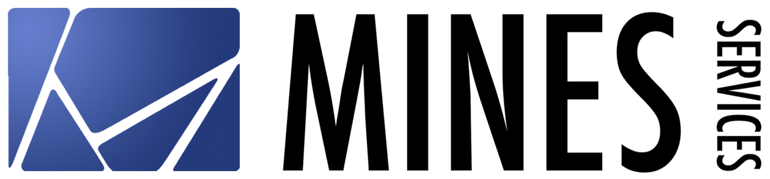 Logo de la Junior-Entreprise de l’école nationale supérieure des mines de Nancy